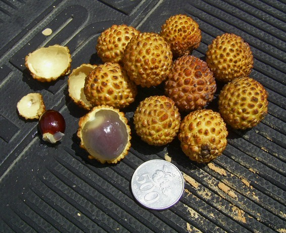 Dimocarpus longan ssp malesianus fruit, from Muara Lawa, West Kutai, East Kalimantan, Indonesia